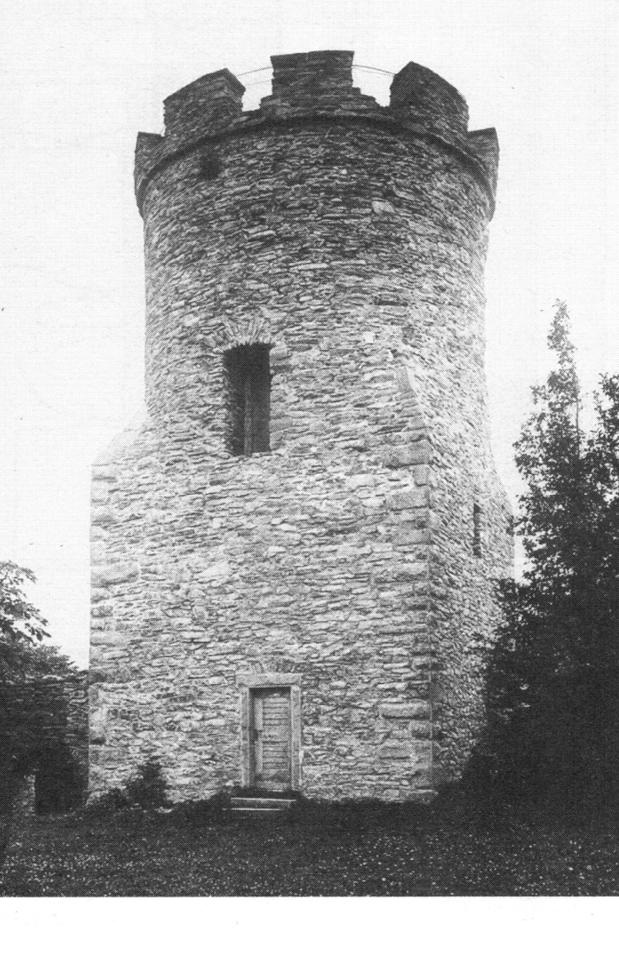 Südturm Ebersburg 1901 (Bildarchiv Foto Marburg Neg 811.427)